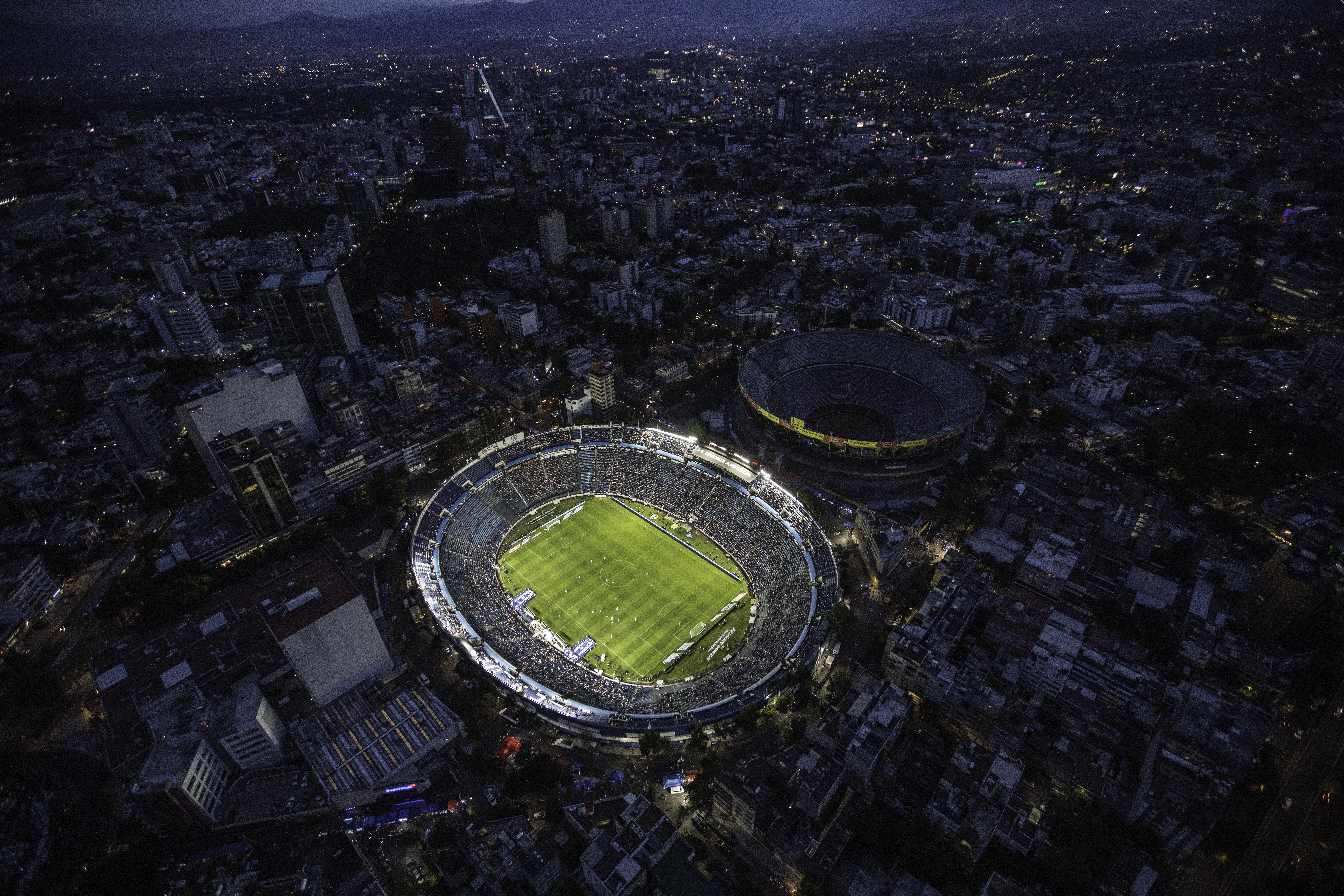 Fotografías de la Ciudad de México desde el aire.